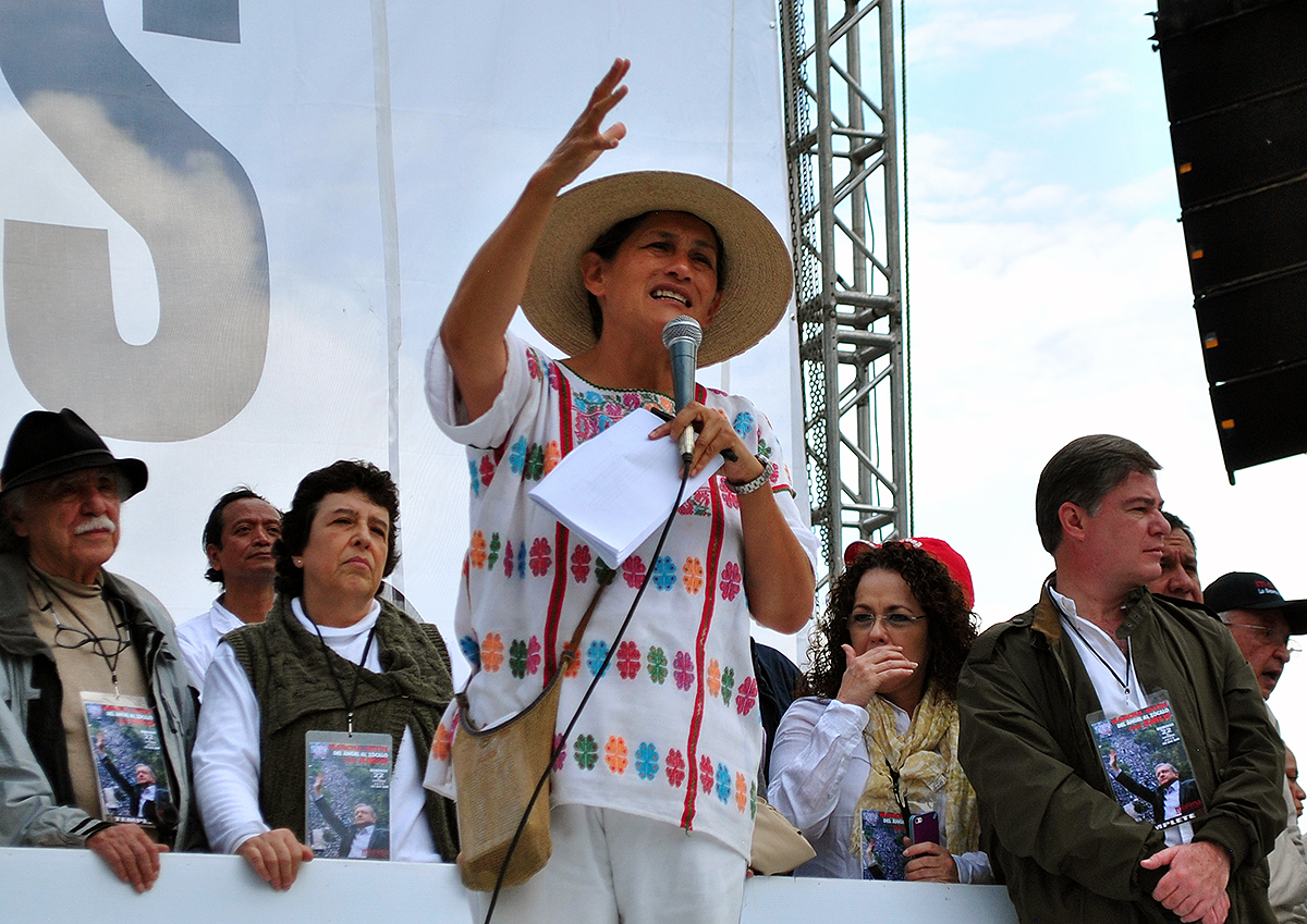 Jesusa Rodríguez como oradora de la "Marcha-mitin en defensa del petróleo" en el Monumento a Colón en la ciudad de México.